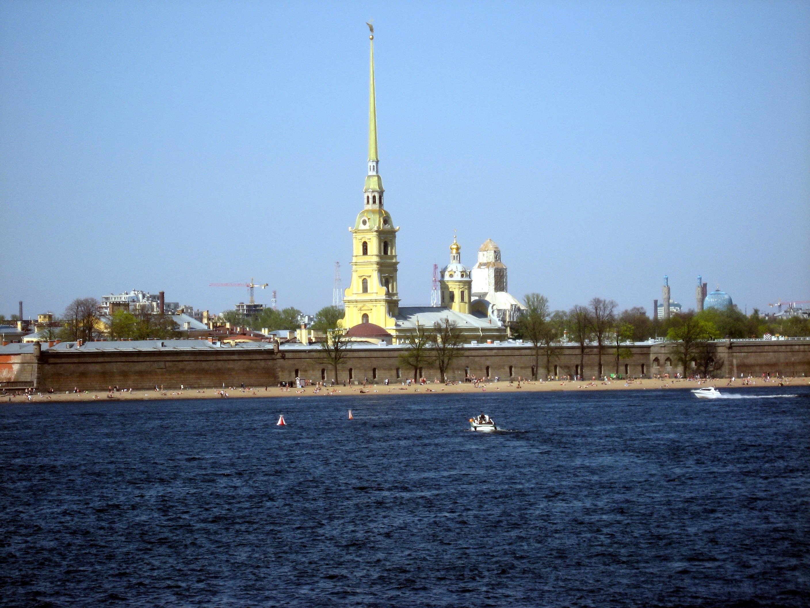 Sankt-Petěrburg, Něva a Petropavlovský chrám